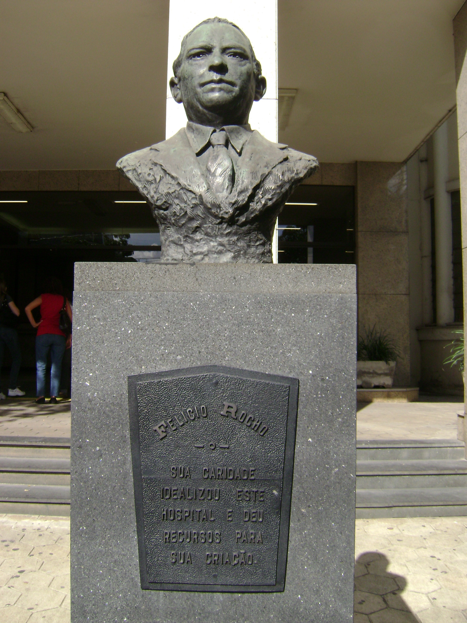 Estátua de Felicio Rocho, no hospital de mesmo nome, em Belo Horizonte, Minas Gerais, Brasil.